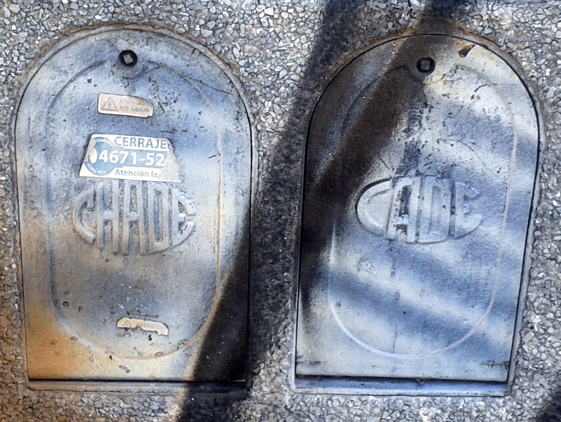 Localizadas en el barrio de Villa General Mitre, cerca del límite con Villa Santa Rita y Villa del Parque